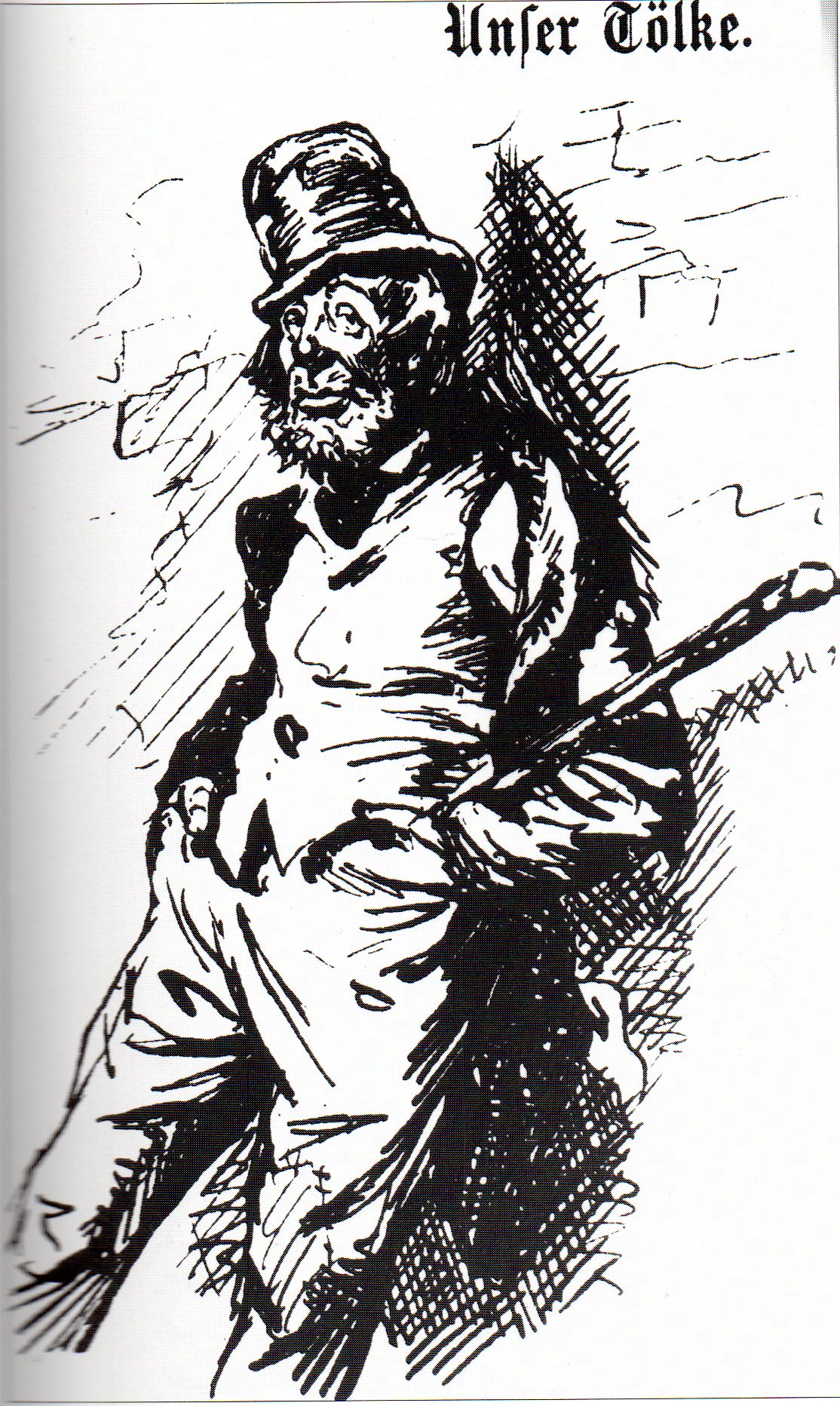 zeitgenössische Karikatur auf Carl Wilhelm Töclke (1817-1893)